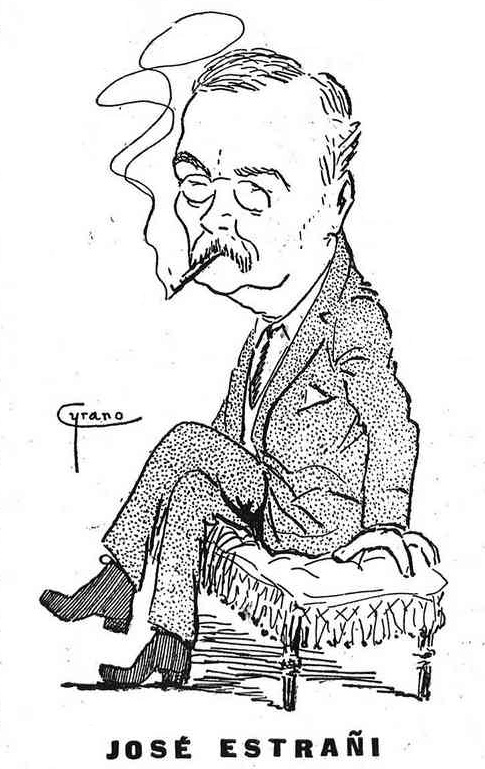 José Estañi.